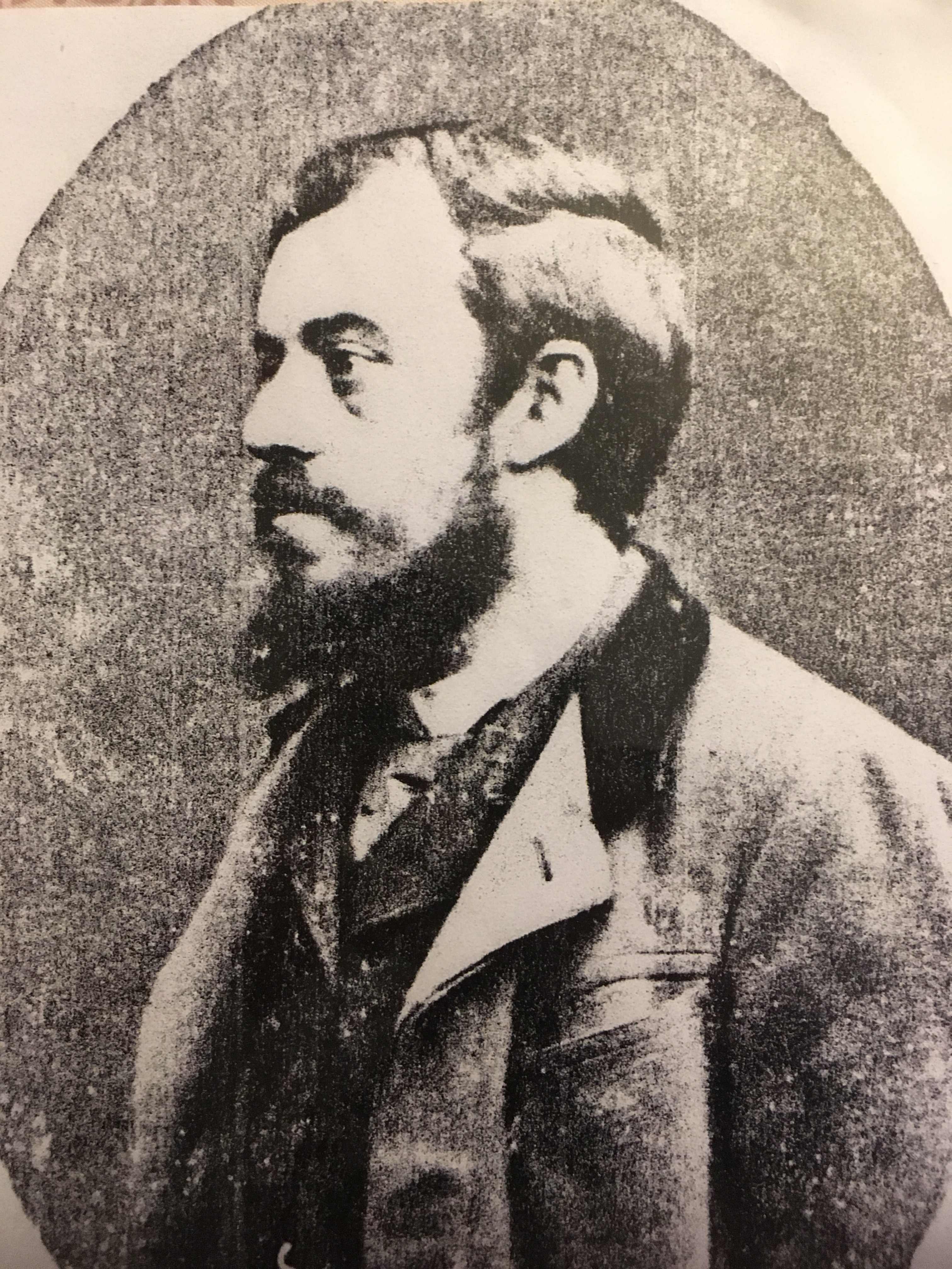 Orgelbouwer Frans Xavier Fréderic Loncke (1862-1933), zoon van Pieter Albertus (Orgelbouwer familie Loncke)